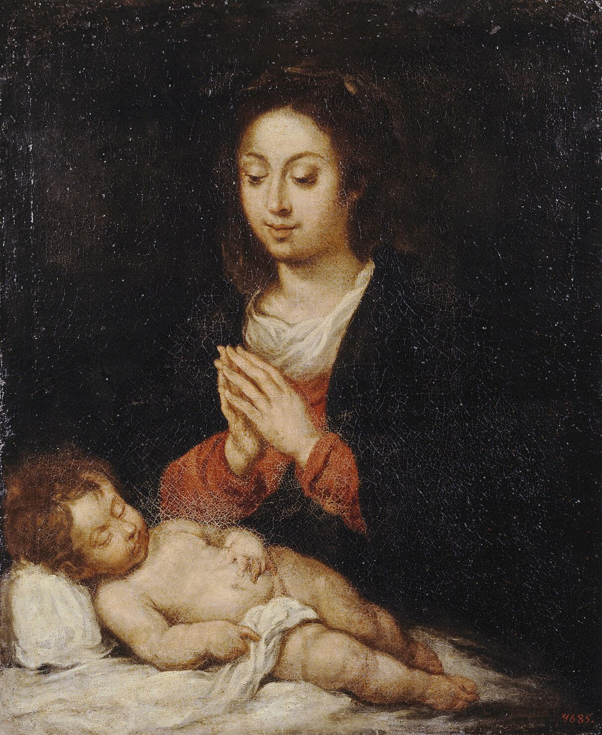 Virgen con el Niño dormido